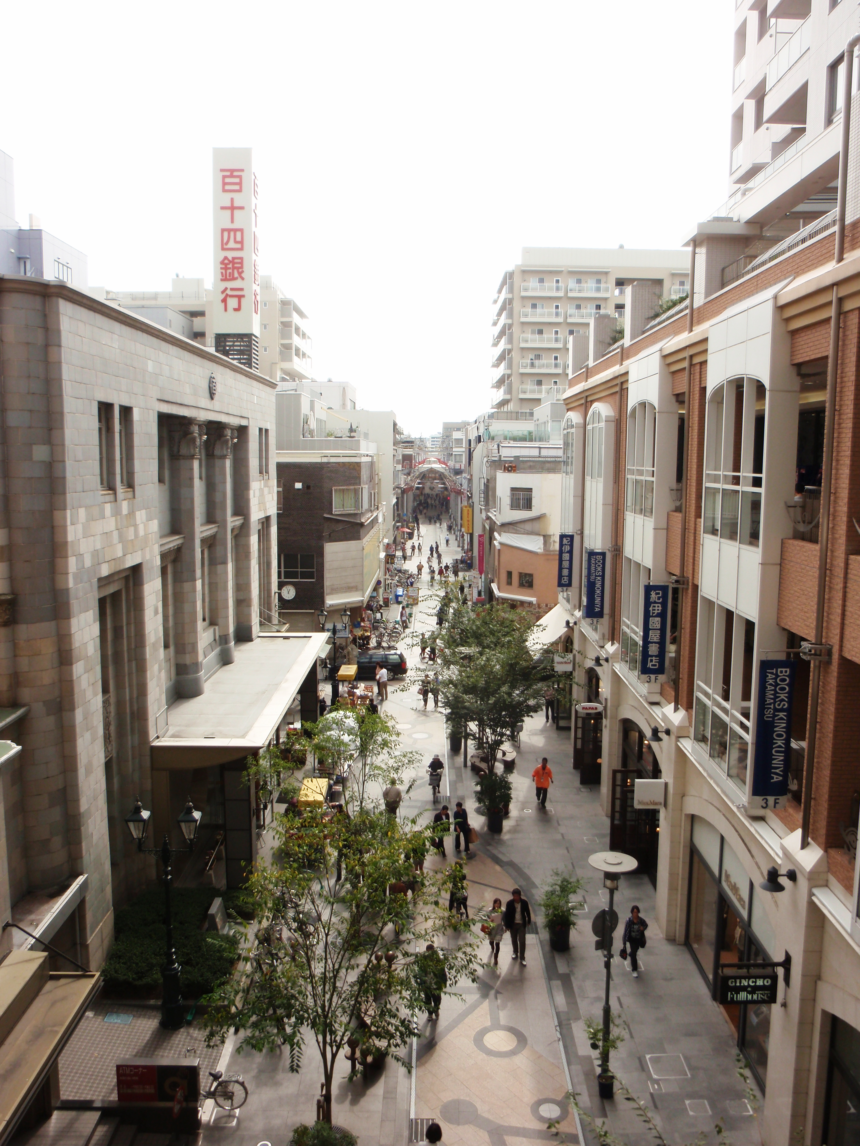 香川県高松市の丸亀町商店街。三町ドームから南を見る。